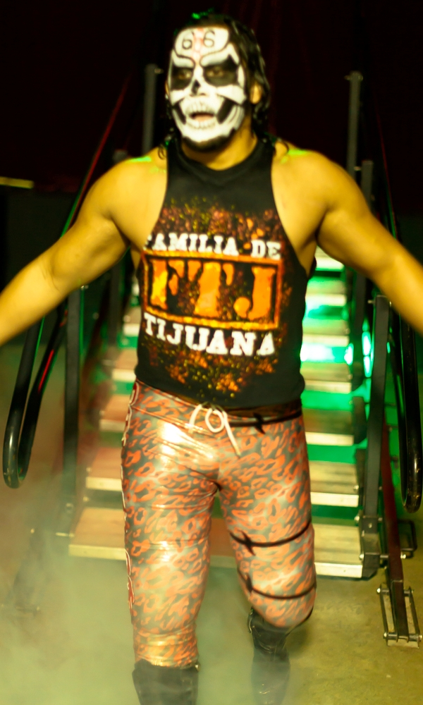 PWR-WAT-20130127-0247.jpg